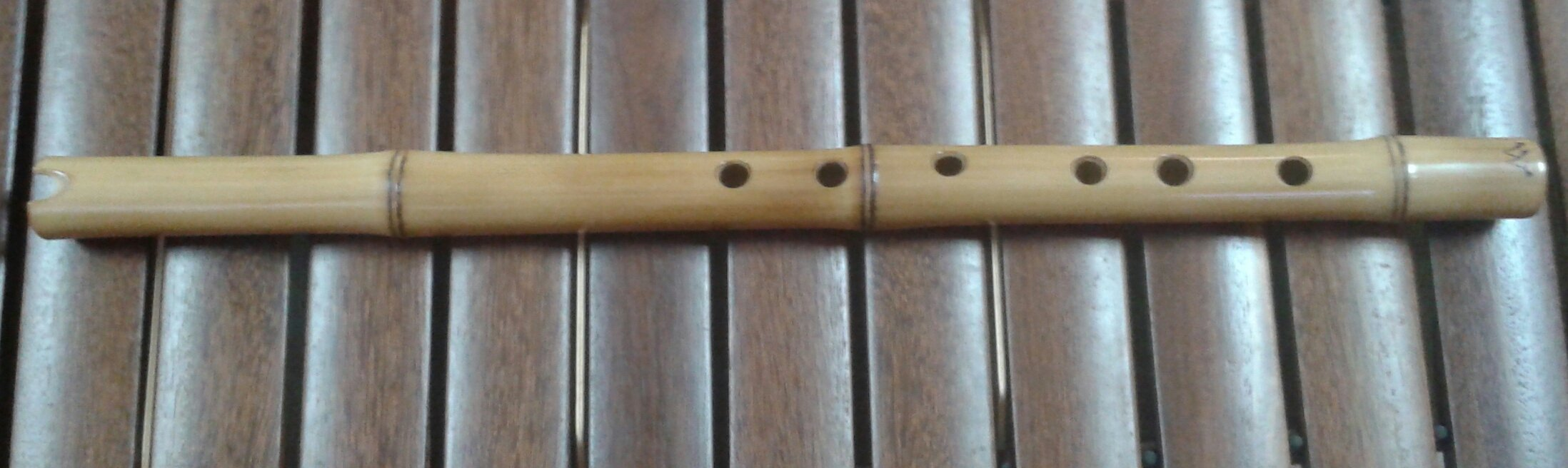 Quenacho de bambú del luthier argentino Ángel Sampedro del Río (Un mundo de bambú).